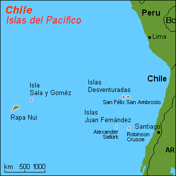 Mapa de algunas islas de Chile en el océano Pacífico